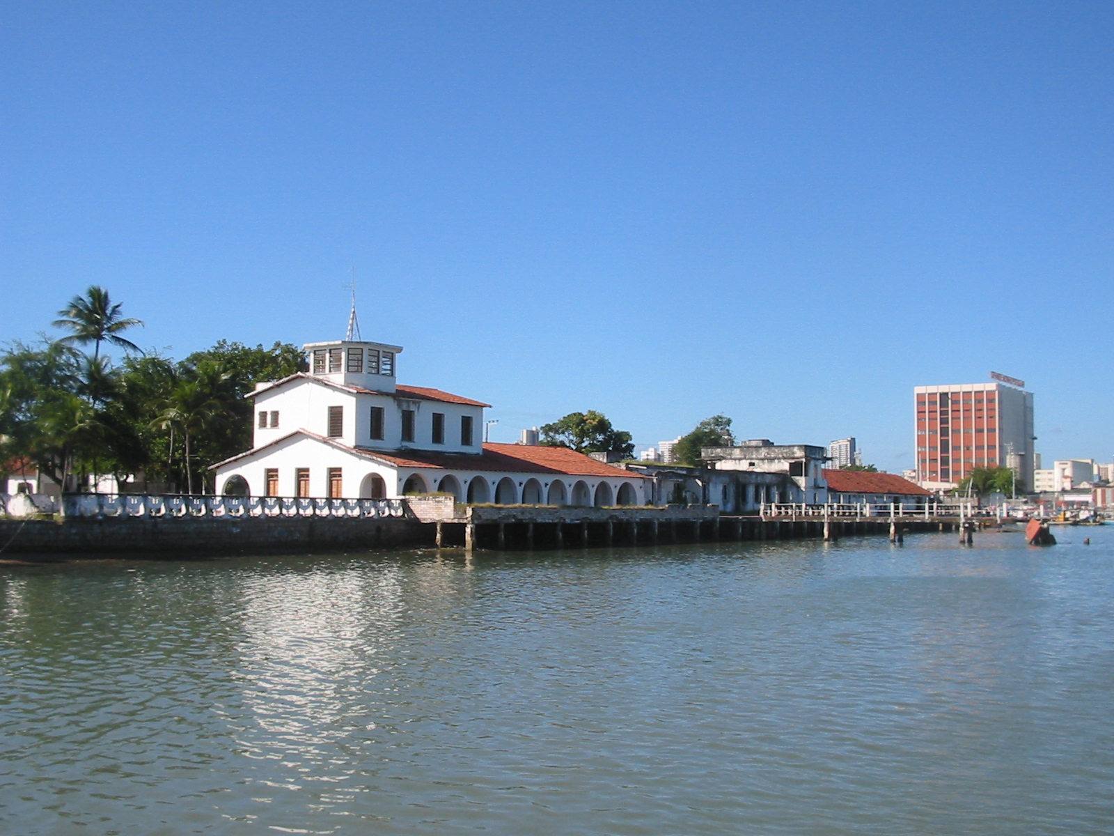 Natal (Rio Grande do Norte), Brazil. Rampa, antiga base de embarque e desembarque de passageiros de hidroaviões, vista do Rio Potengi. Rampa, a former seaplane air base. View from the Potengi River. Natal (Rio Grande do Norte), Brazil.